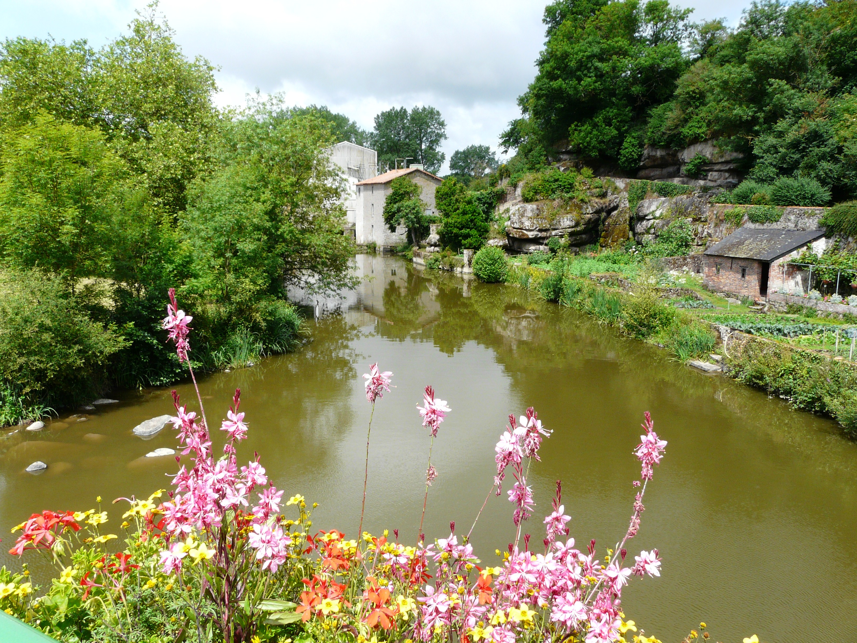 La Sèvre nantaise en aval du pont de Mallièvre, en limites de Mallièvre (à droite) et Les Epesses (à gauche), Vendée, France